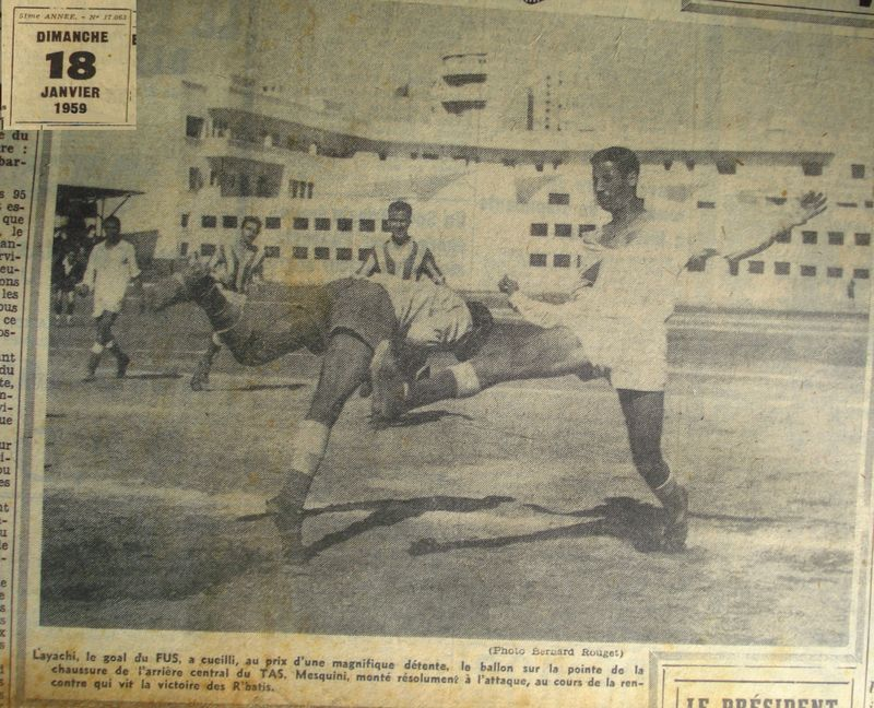 TAS-FUS que le FUS remporte 1-0. 1958-1959.